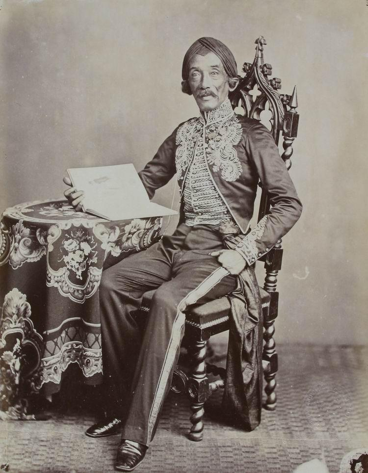 Portrait of Raden Saleh Sjarif Boestaman (1811-1880), Indonesian painter